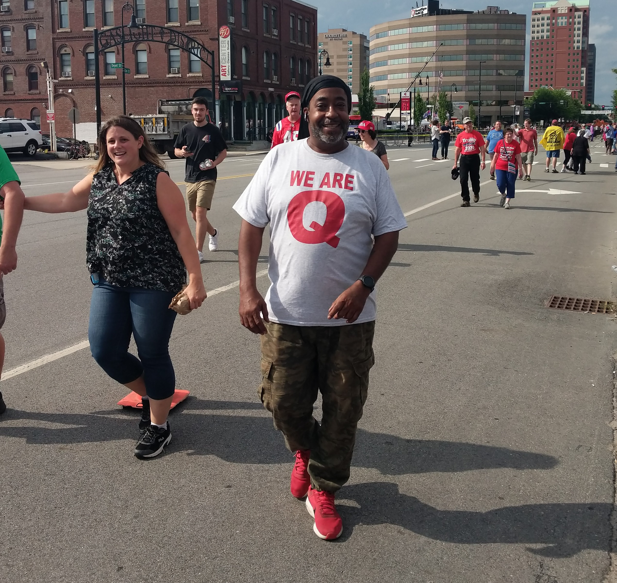 QAnon vendor